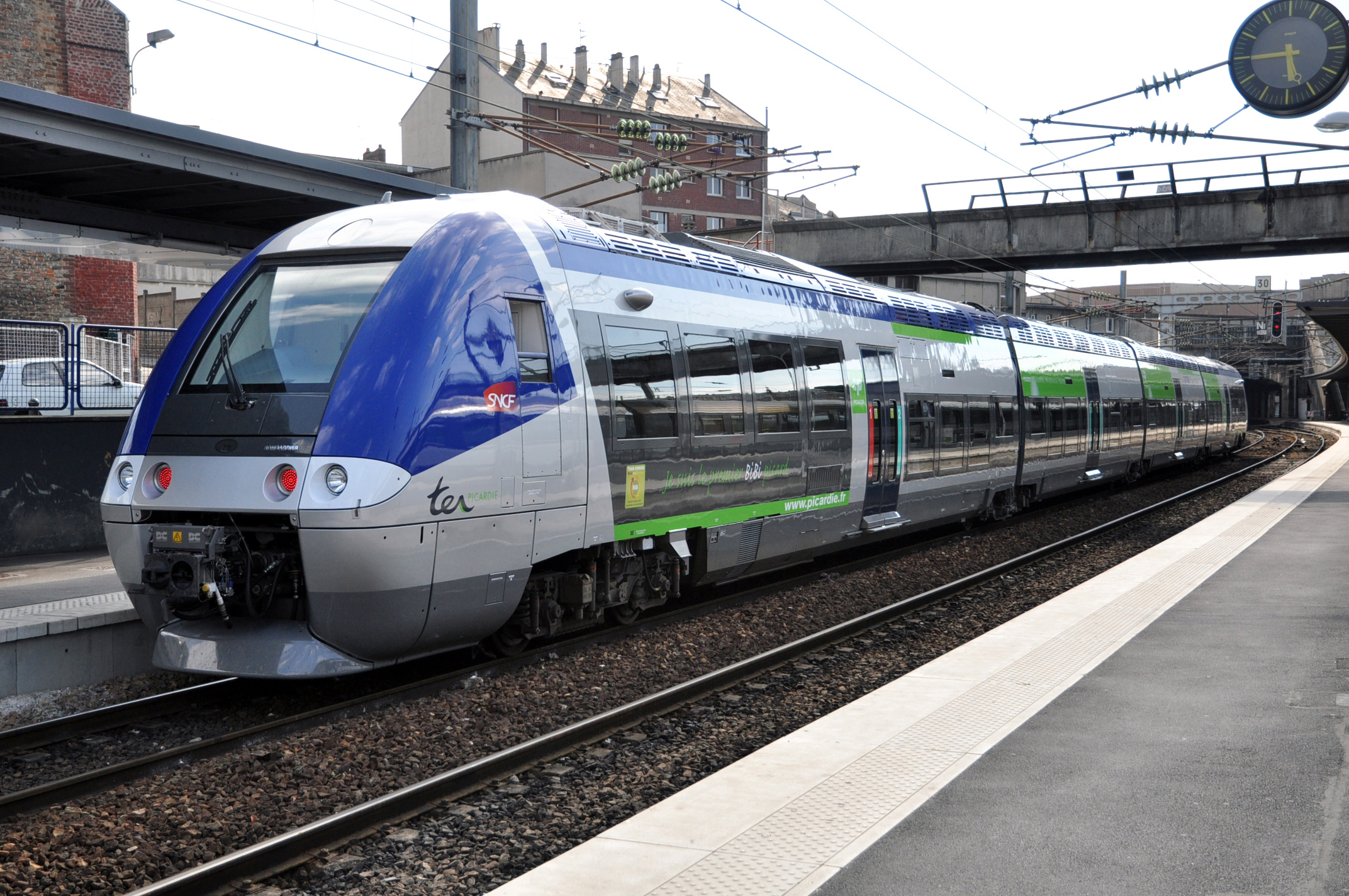 B82597/98 en stationnement en gare d'Amiens